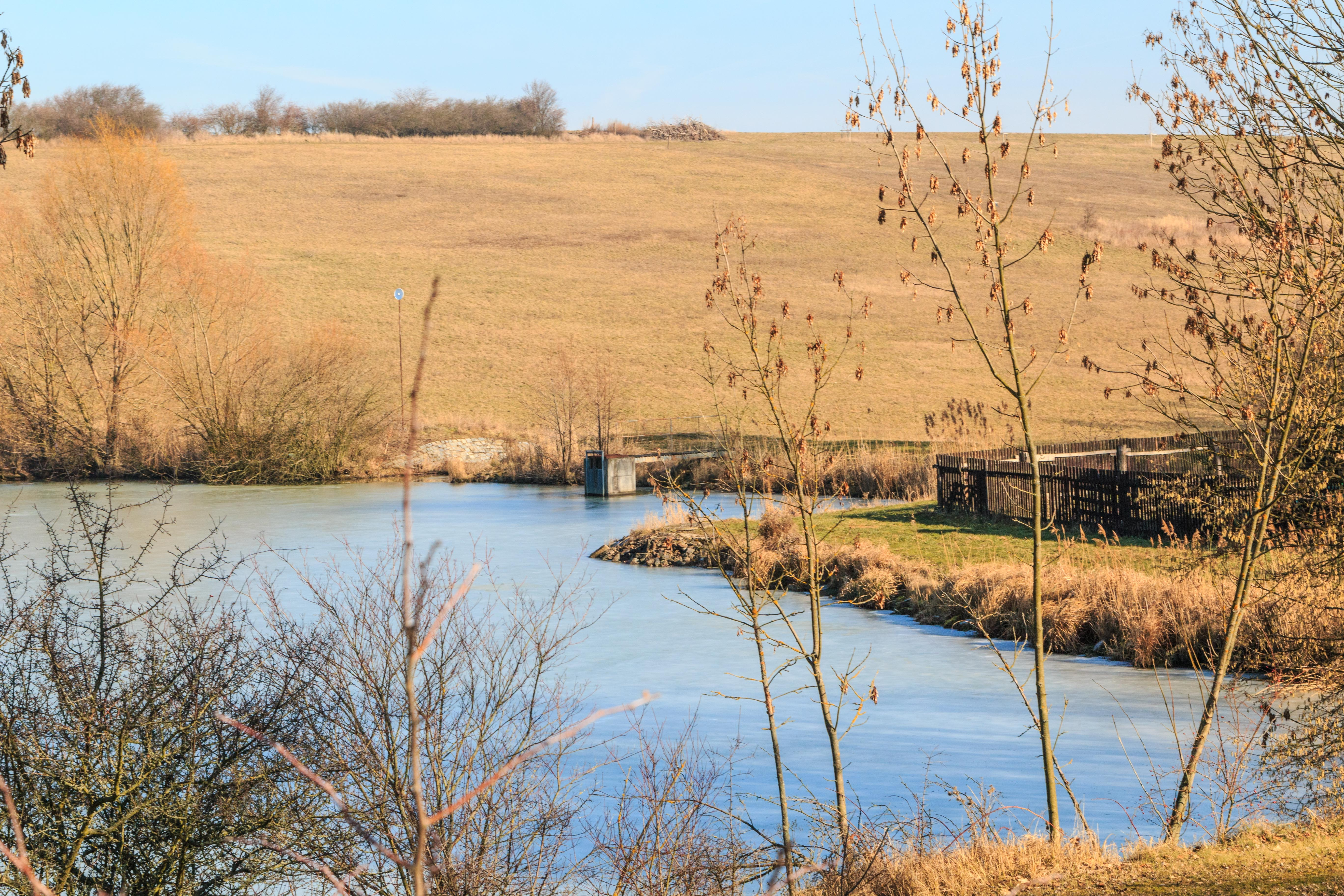 Rybník nad mlýnem Prachovna u Seletic Project: Vodstvo. Ticket: 1711.